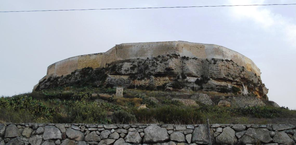 Die Zitadelle von Rabat (auf Gozo / Malta)